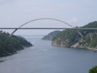 Svinesund Bridge.